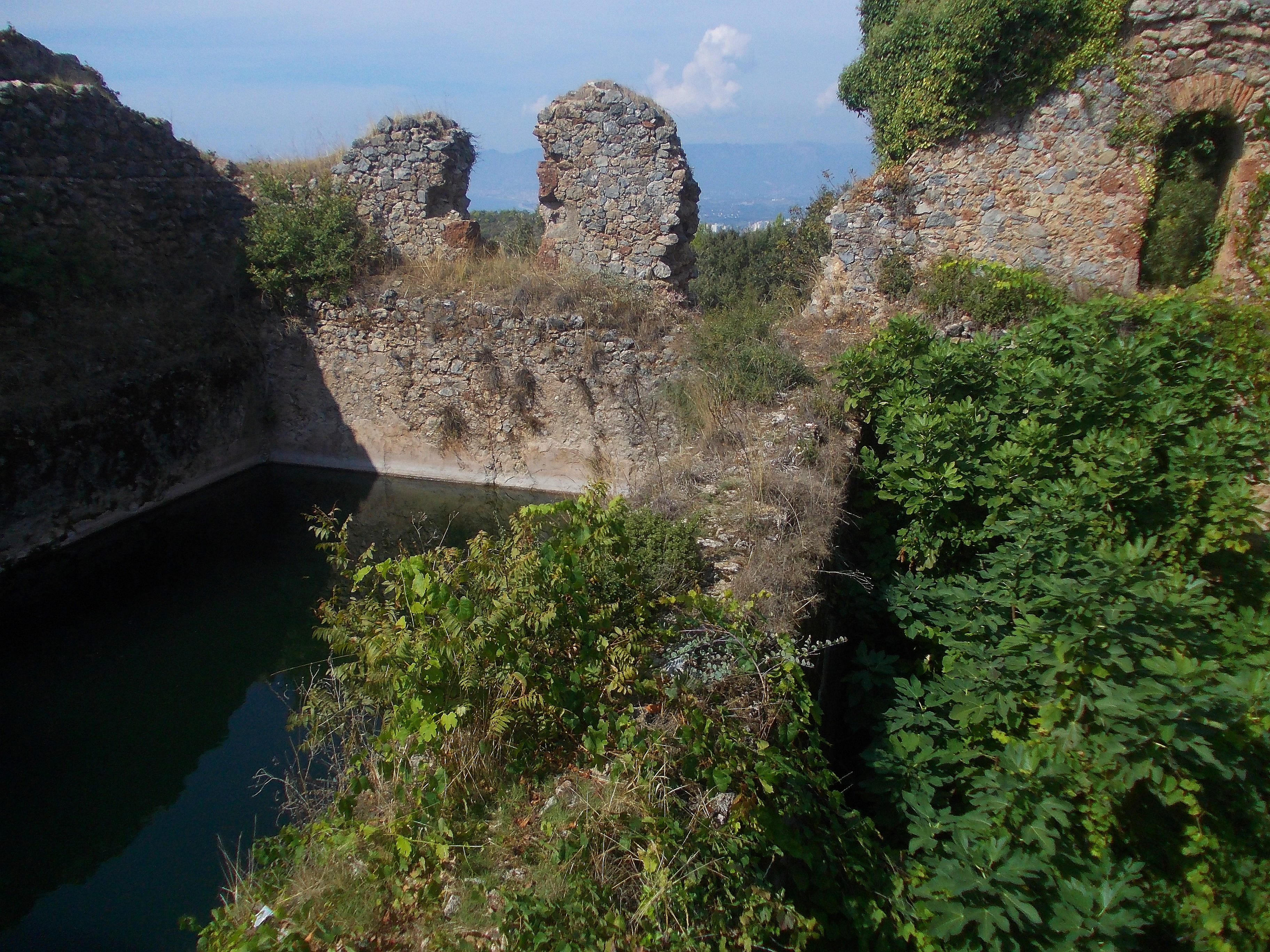 Alanya-Syedra-Westteil - 4-6. Wasserreservoir Quellwasser und Zisterne